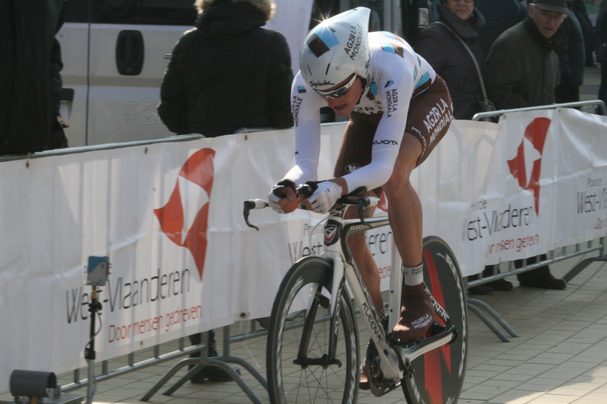 Driedaagse van West-Vlaanderen 2011, proloog in Middelkerke